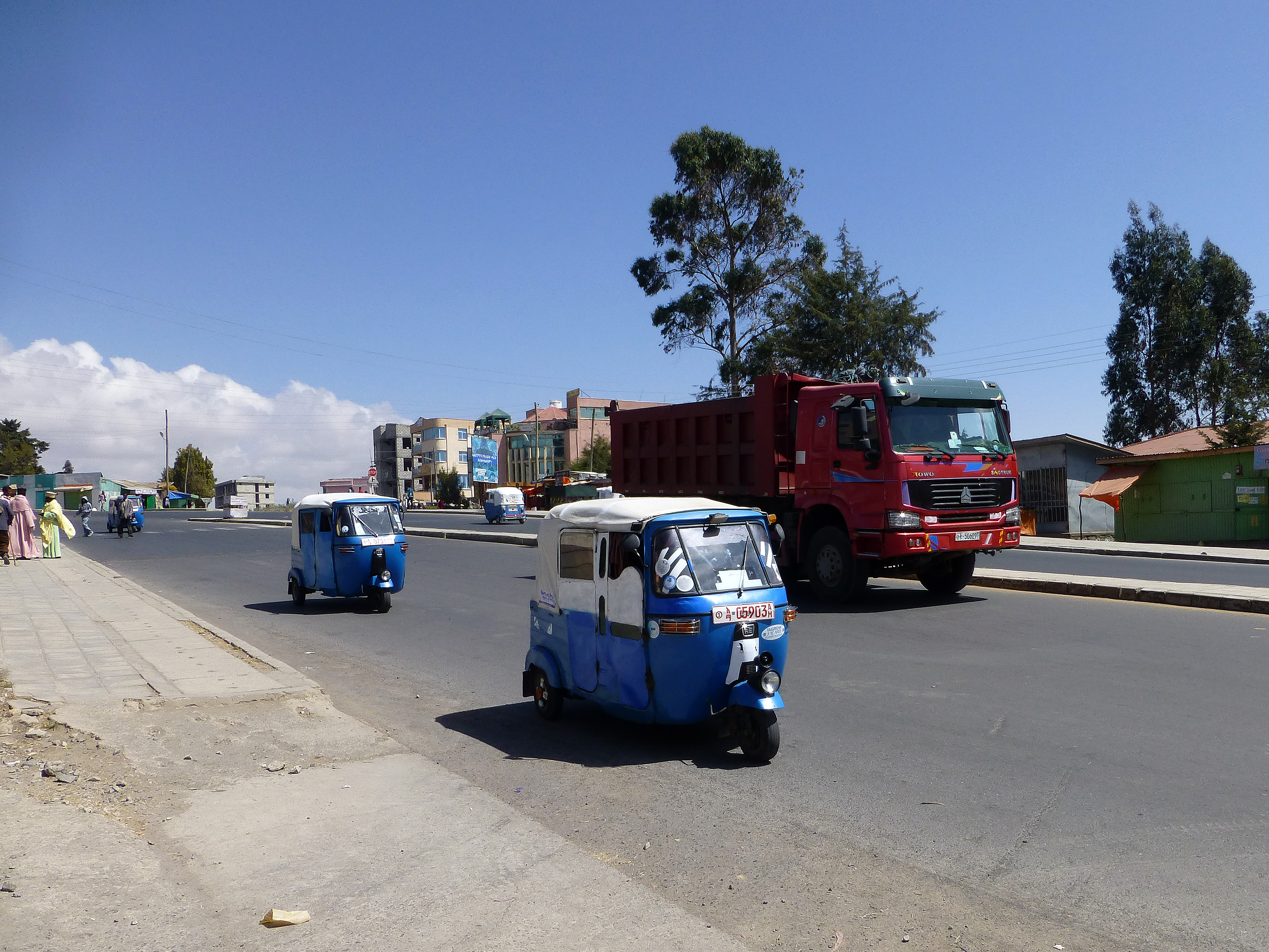 Bajajs à Debre Birham (Ethiopie)